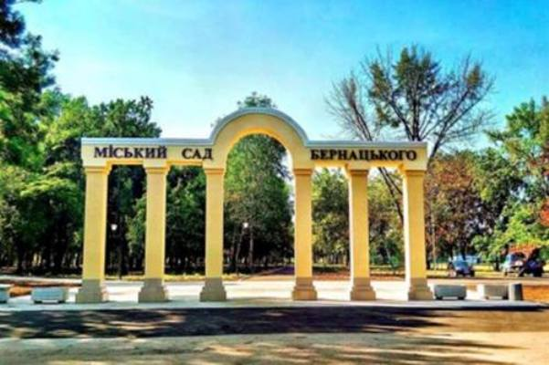 Сад Бернацкого(2016)